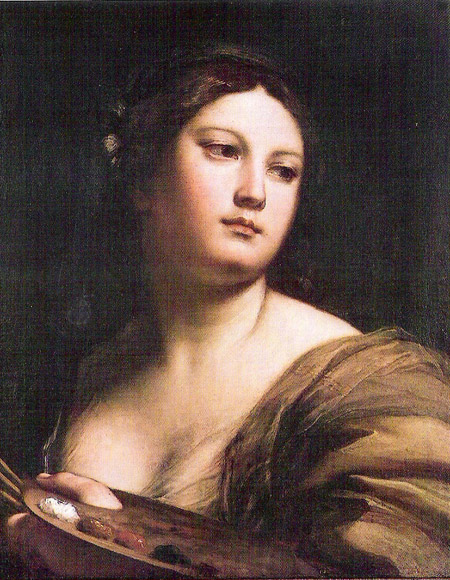 Ritratto di Faustina Maratti, olio su tela, 61 x 50.5, Galleria Palazzo Corsini, Roma